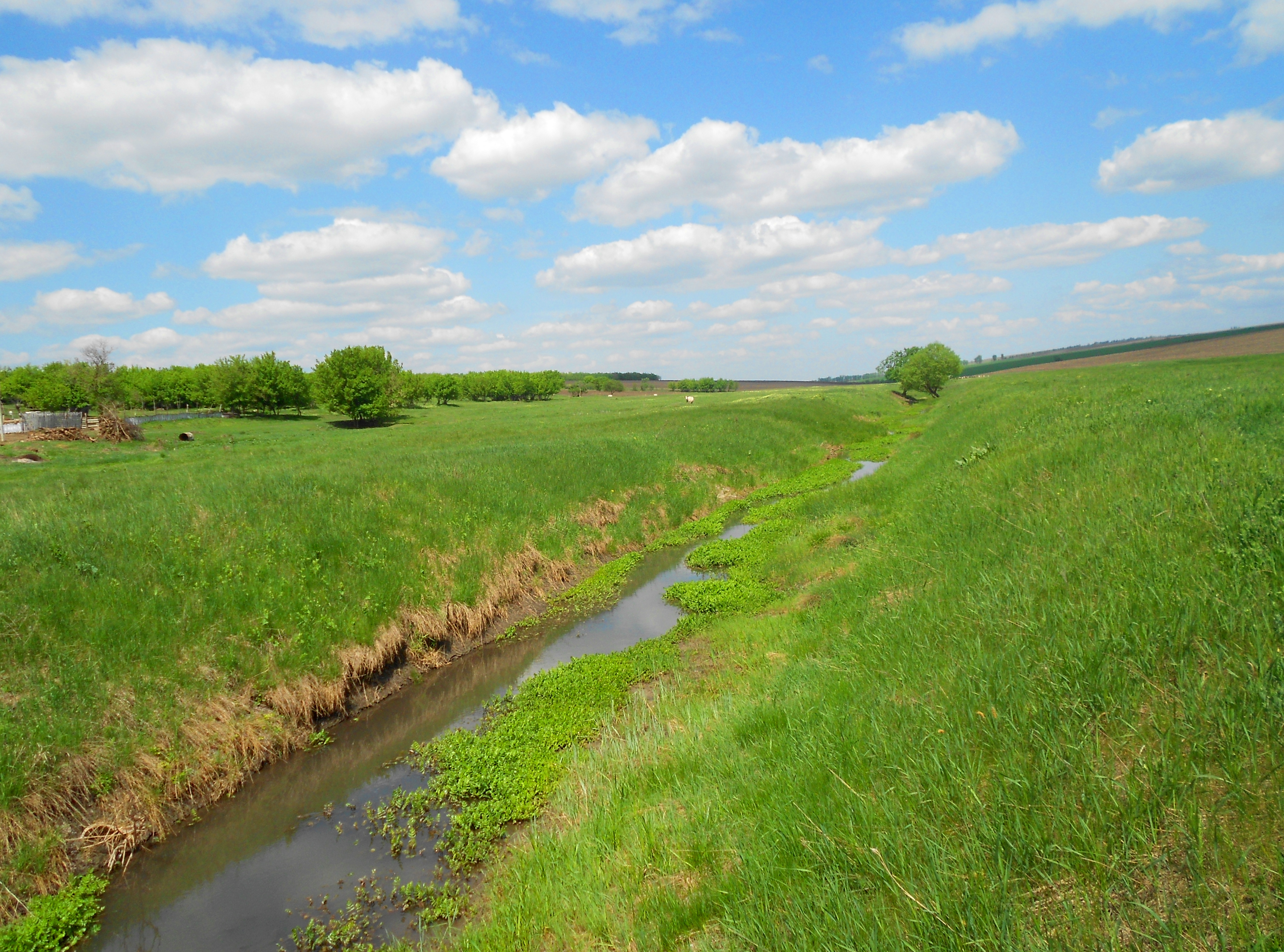 Răut lângă Elenovca, r. Dondușeni